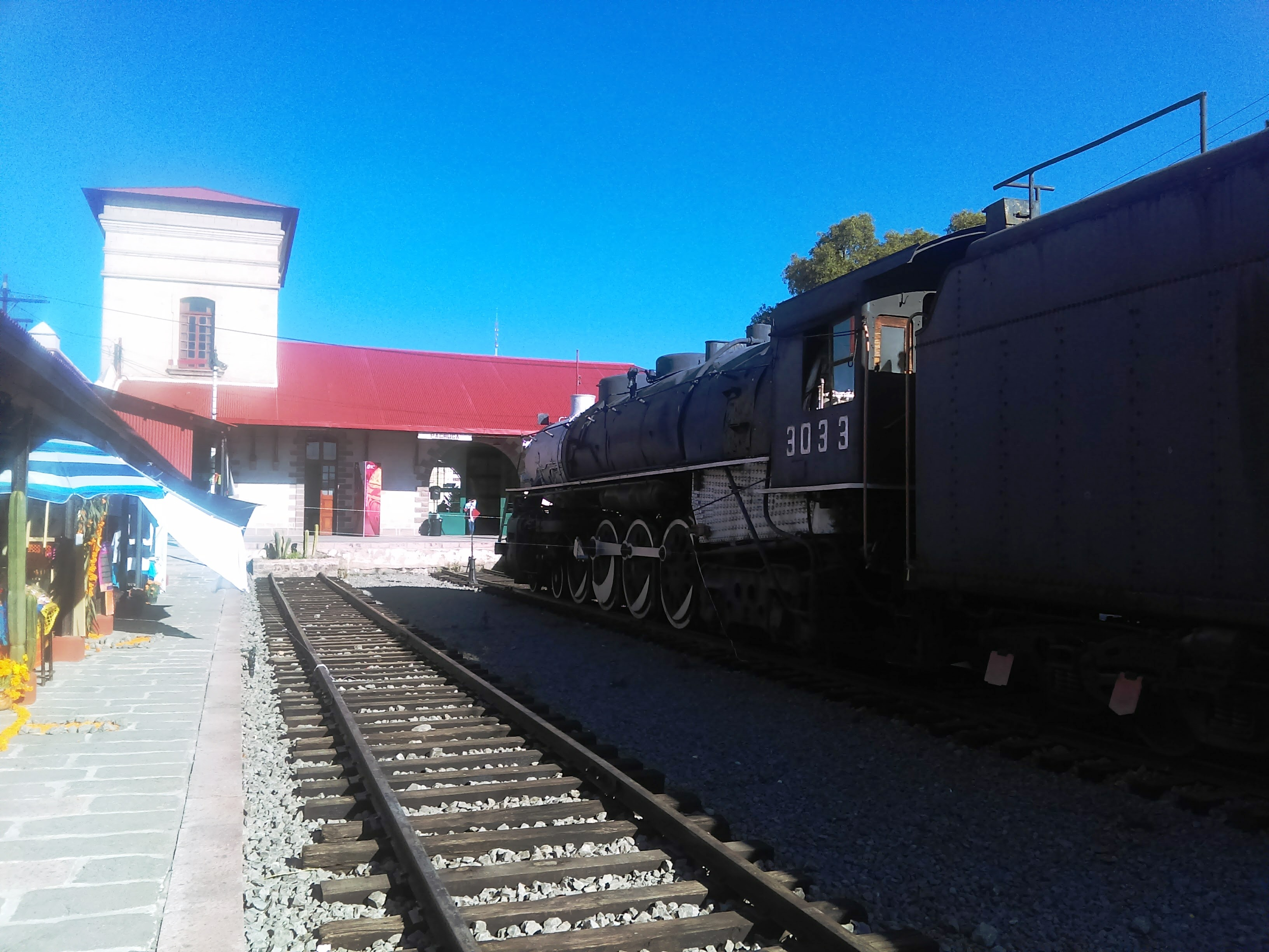 Centro Cultural del Ferrocarril en Pachuca, México